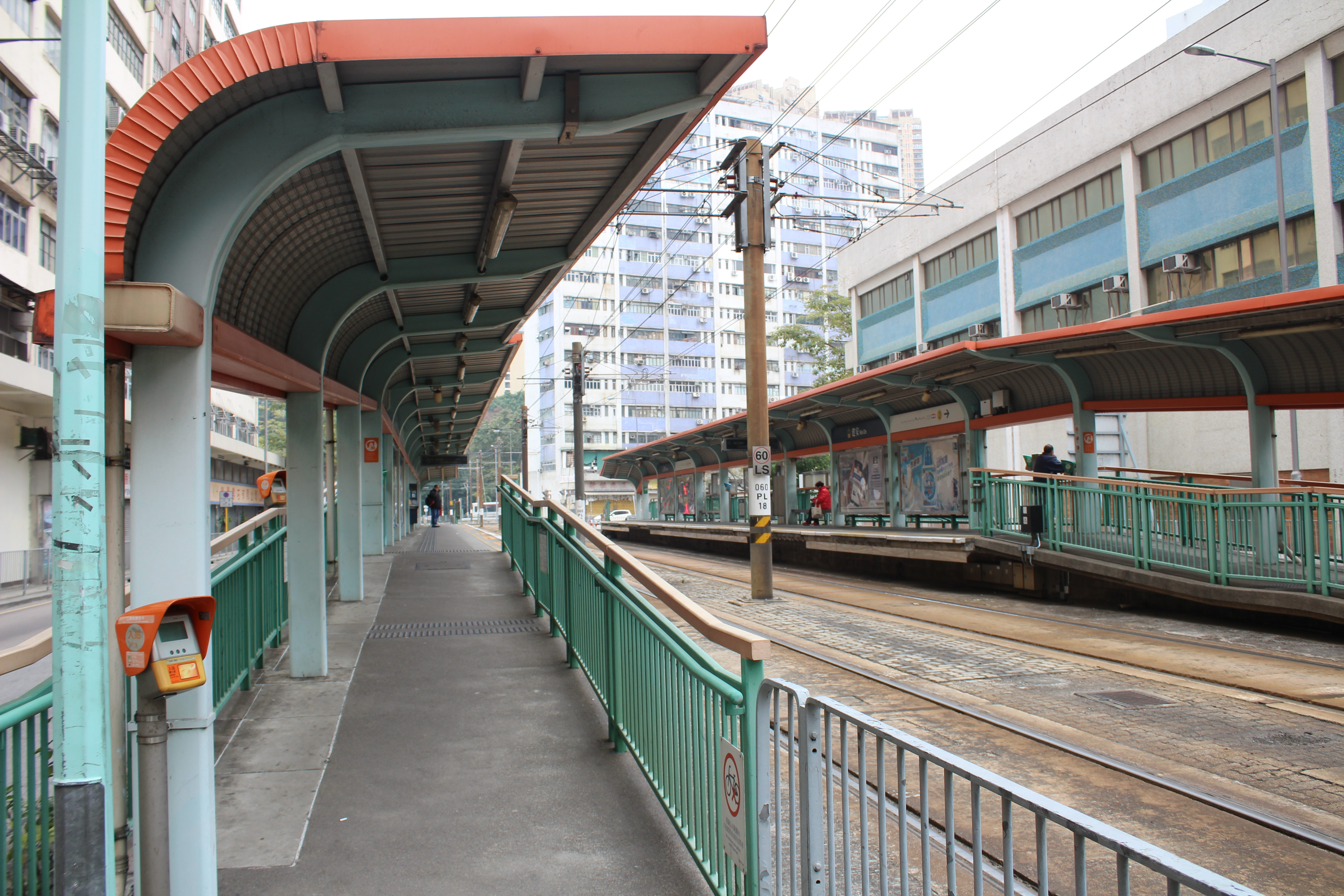 建安站月台